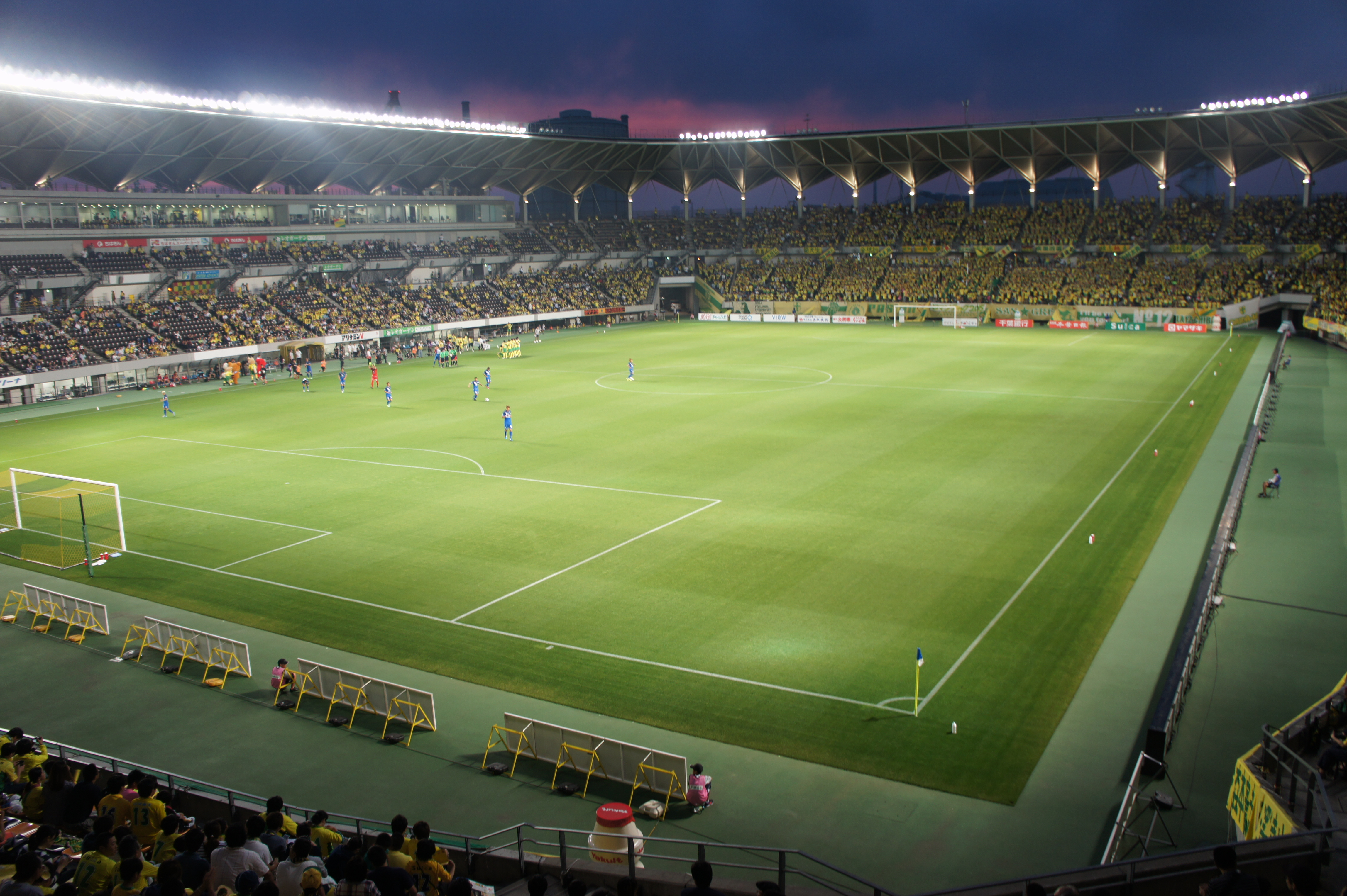 NEX5